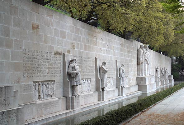 Reformationsdenkmal mit Farel, Calvin, Bèze und Knox in Genf